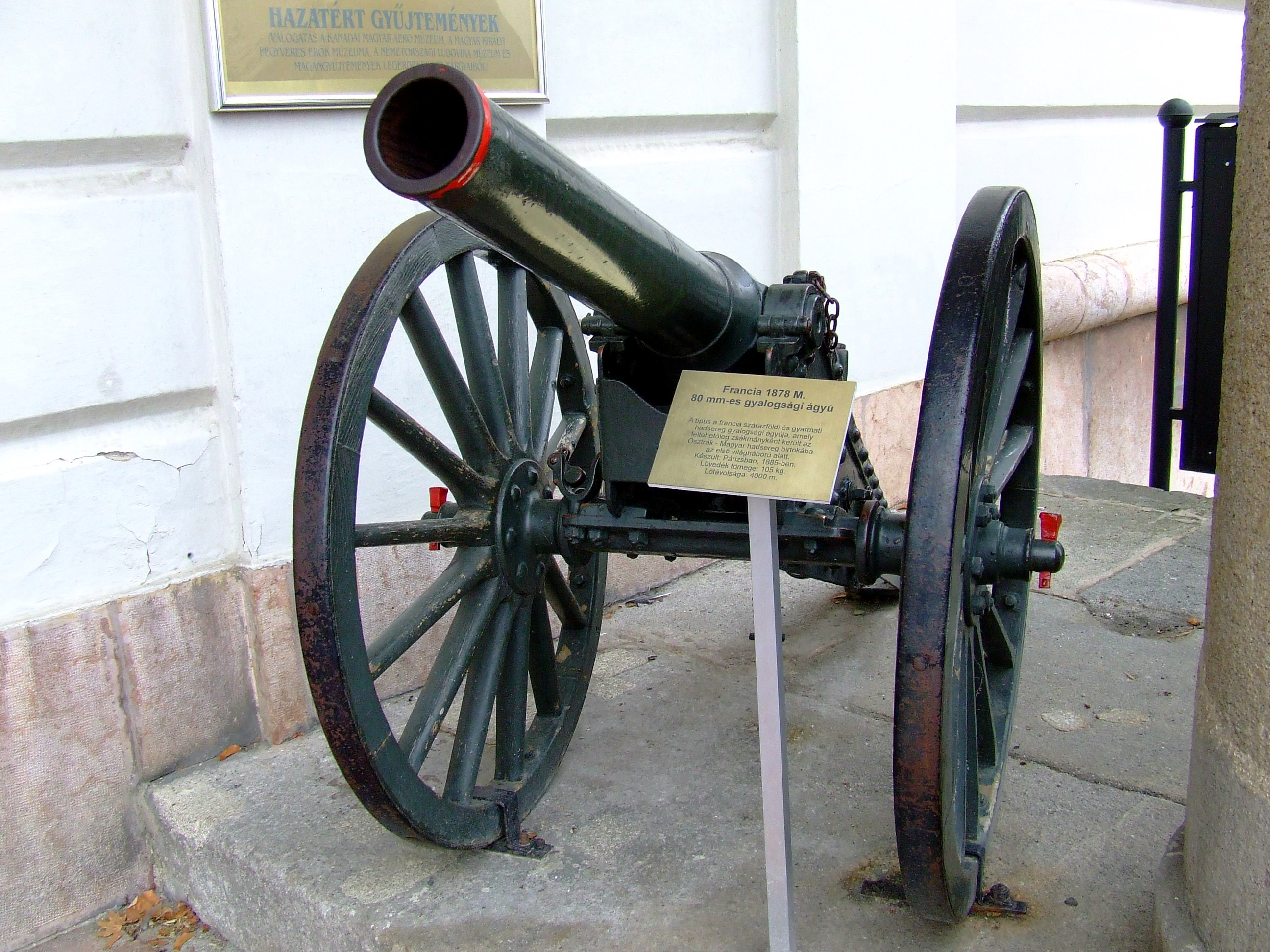 80 mm-es francia gyalogsági ágyú a budapesti Hadtörténeti Intézet és Múzeum bejáratánál, készült 1885-ben Párizsban